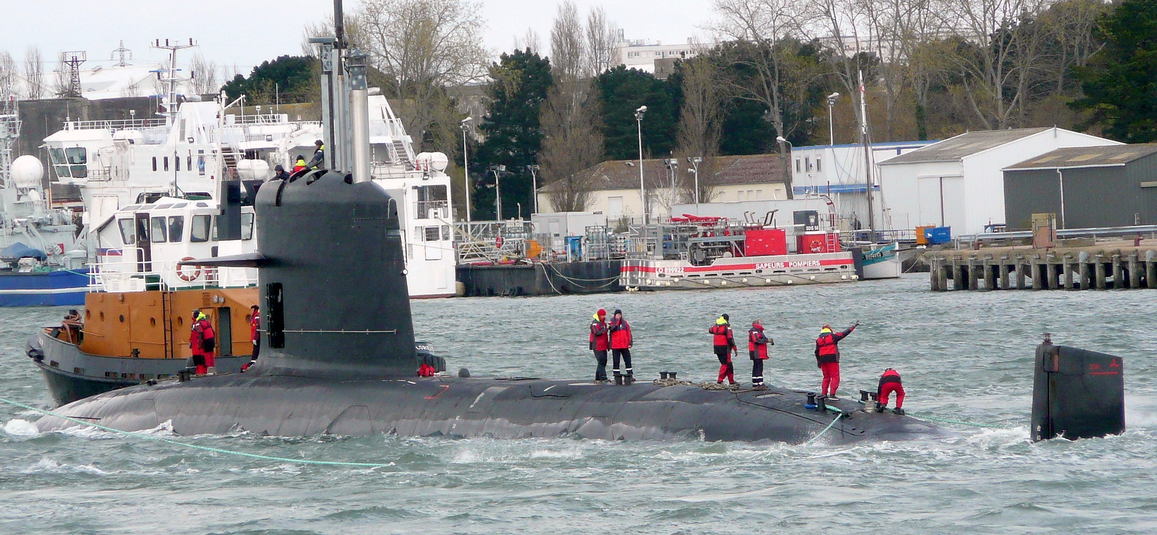 Submarine "Tunku Abdul Rahman" classe Scorpene durant ses essais à Lorient